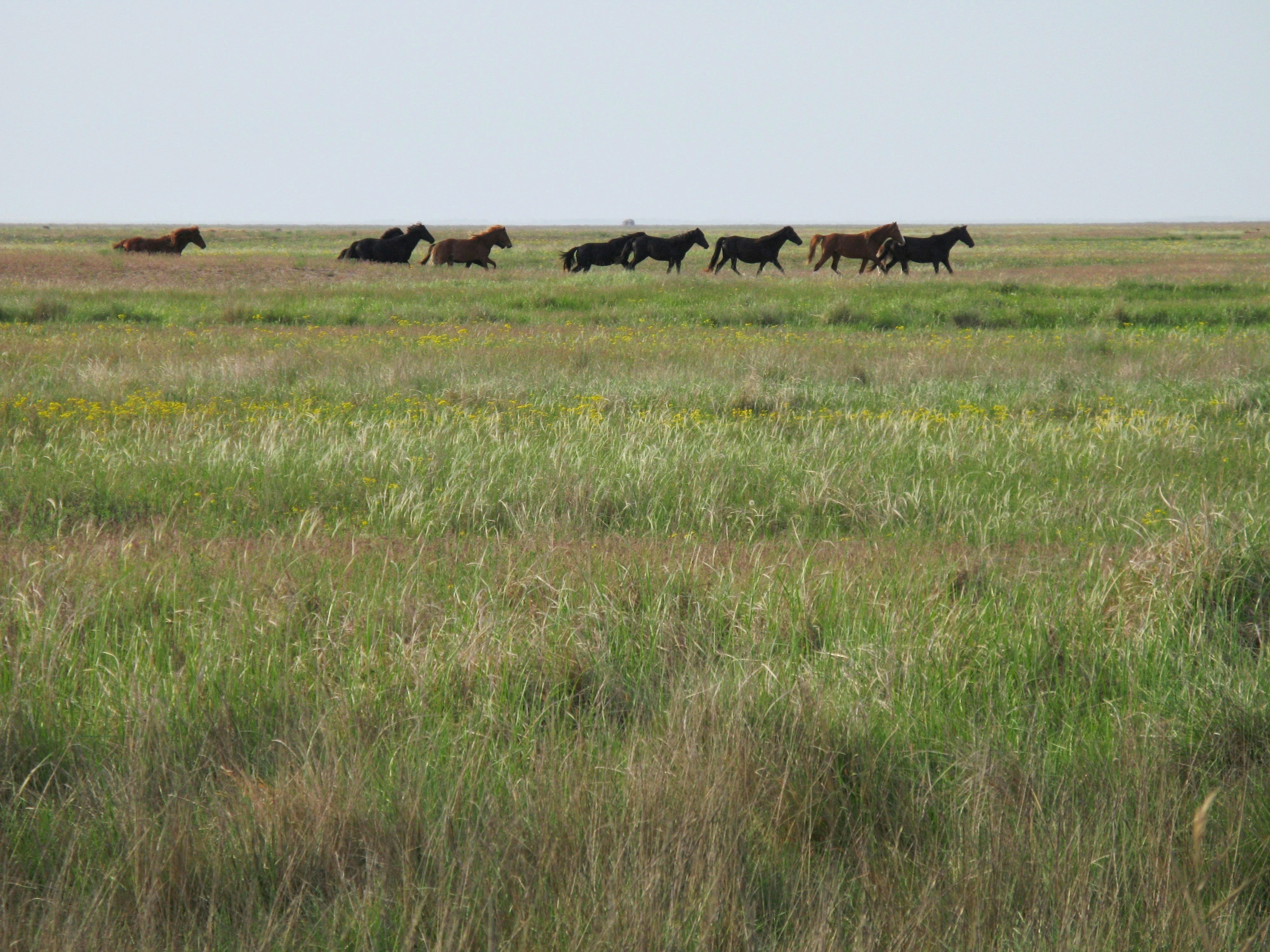 Азово-Сиваський, Генічеський р-н, вул. Петровського 54, м. Генічеськ; Новотроїцький райони